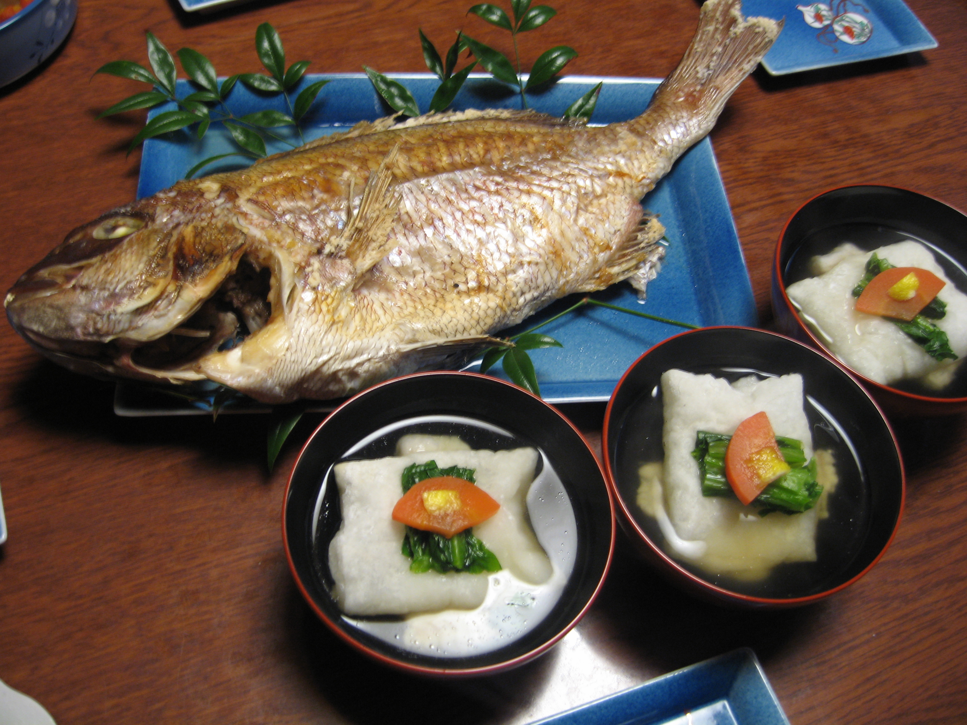 雑煮と鯛の姿焼き